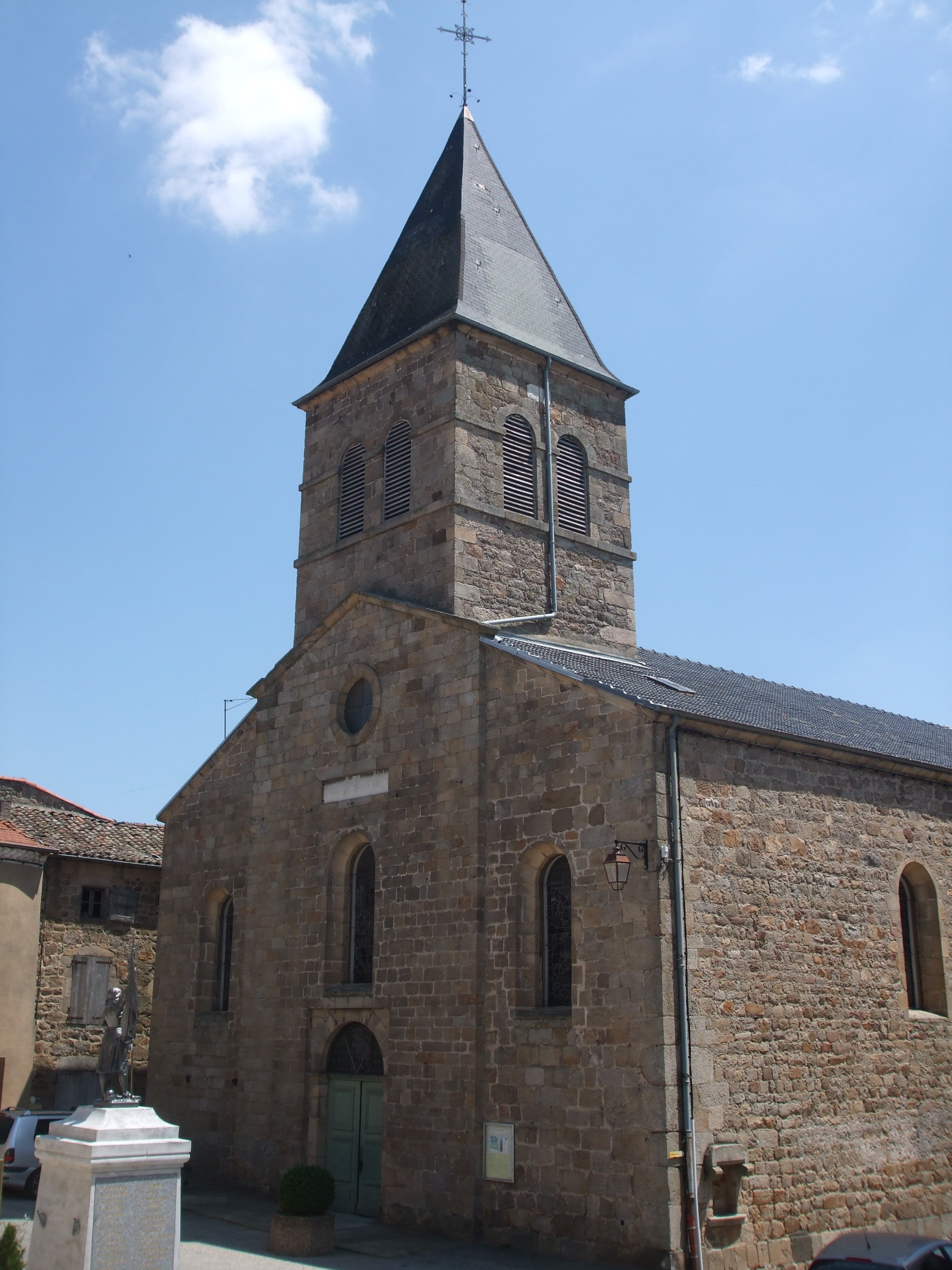 église du Saint Sacrement